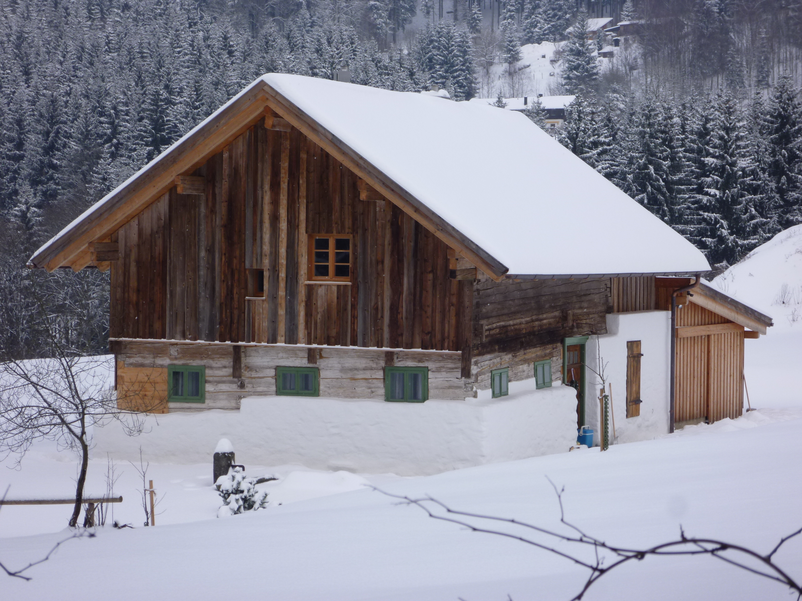 Waldlerhaus in der kleinen Ortschaft Rettenbach, Gemeinde Sankt Englmar.